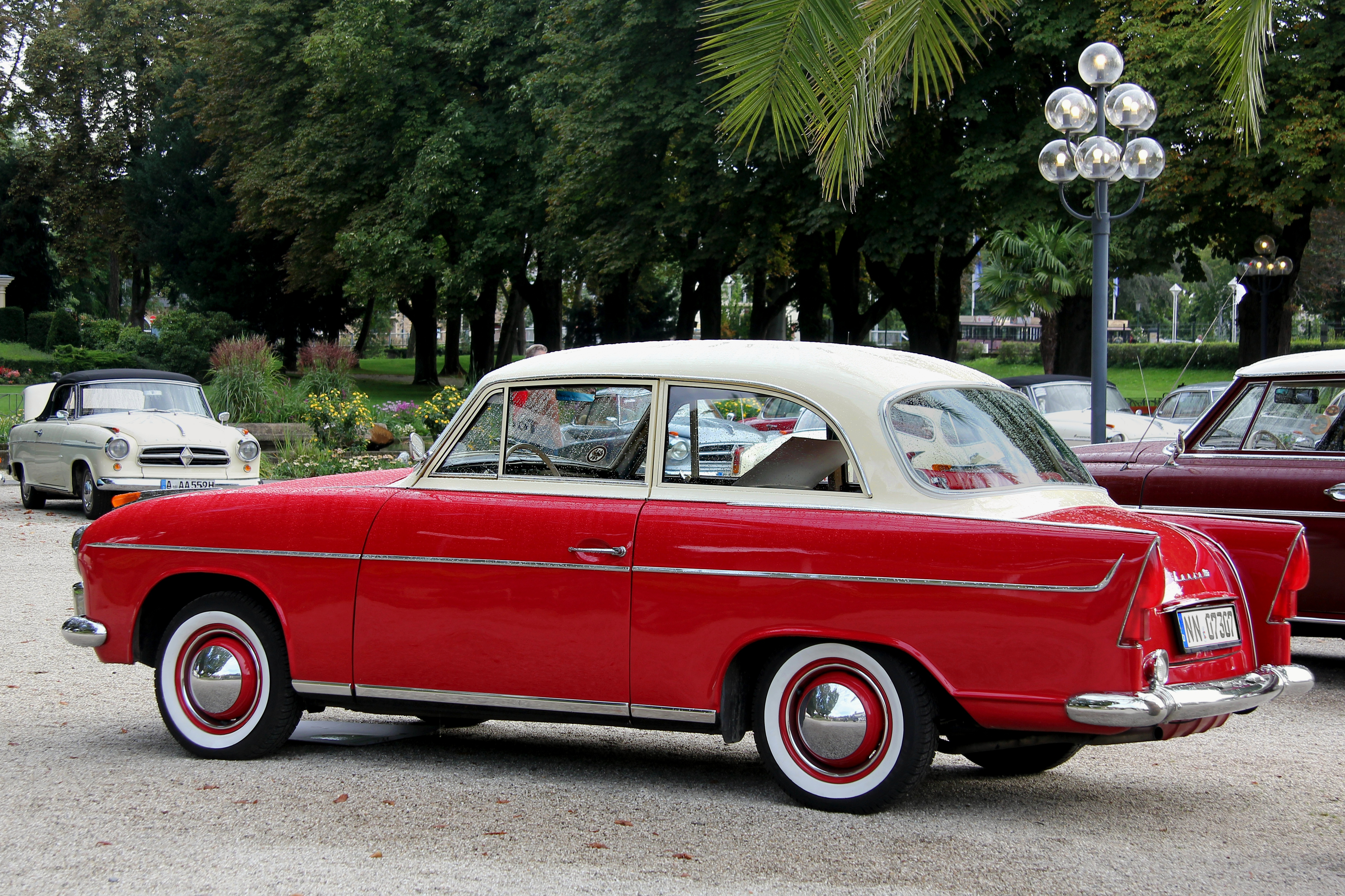 Hansa 1100, Baujahr 1959 (Kennzeichen des Fahrzeugs verändert)